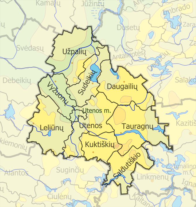 Padaryta iš :image:LietuvosSeniunijos.png